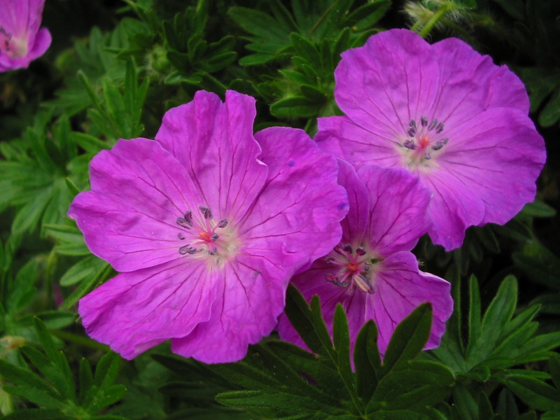 Geranium sanguineum, Jardin alpin, Jardin des Plantes de Paris